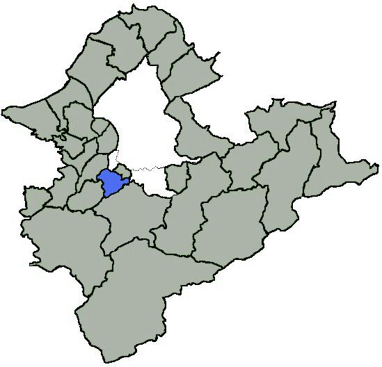 臺北縣中和市位置圖。